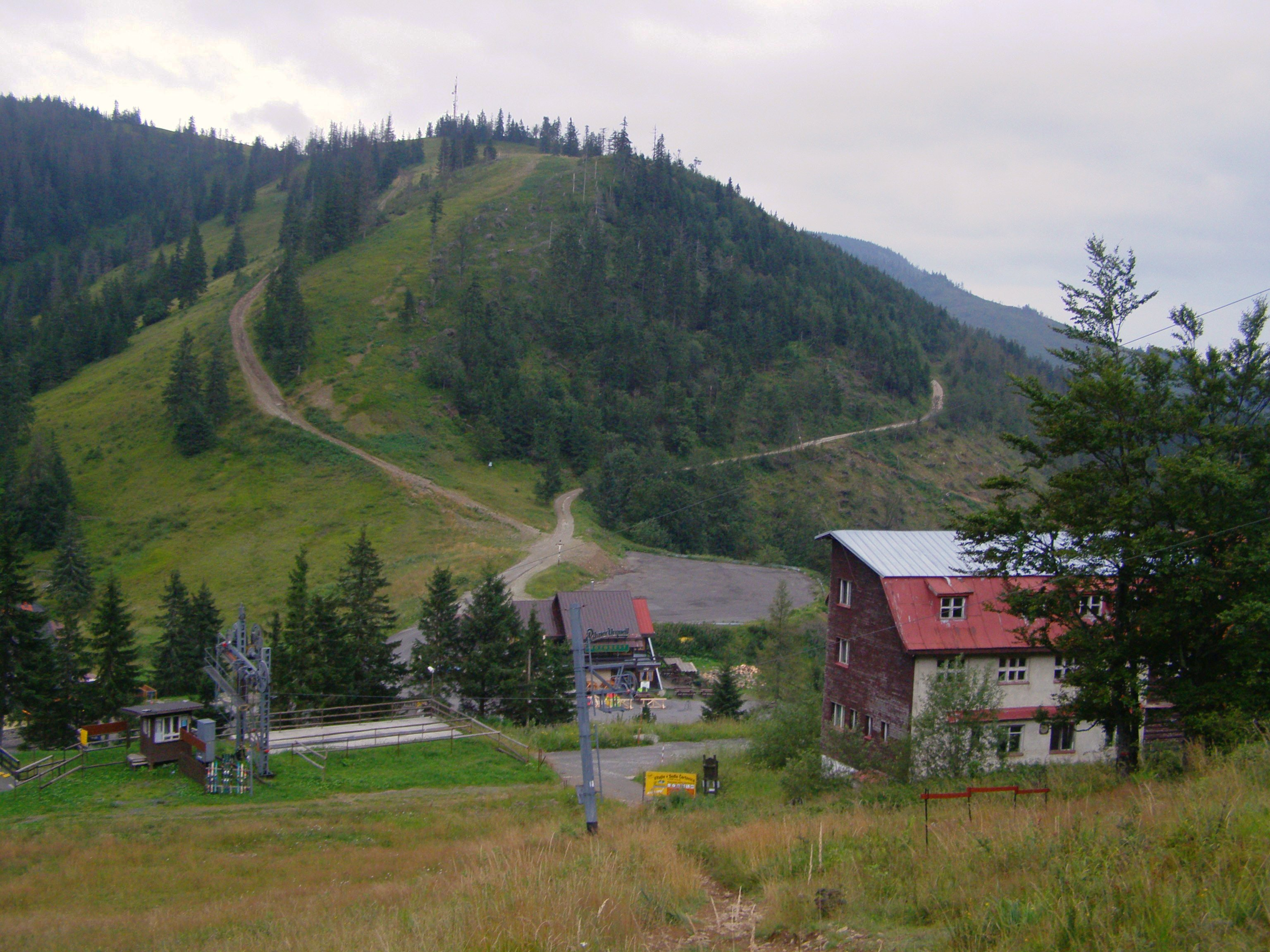 Nízké Tatry, pohled z úbočí vrcholu Rovienky (1602 m) přes sedlo Čertovica (na rozhraní Ďumbierských a Kráľovohoľských Tater) na vrchol Čertova svadba (1463 m)